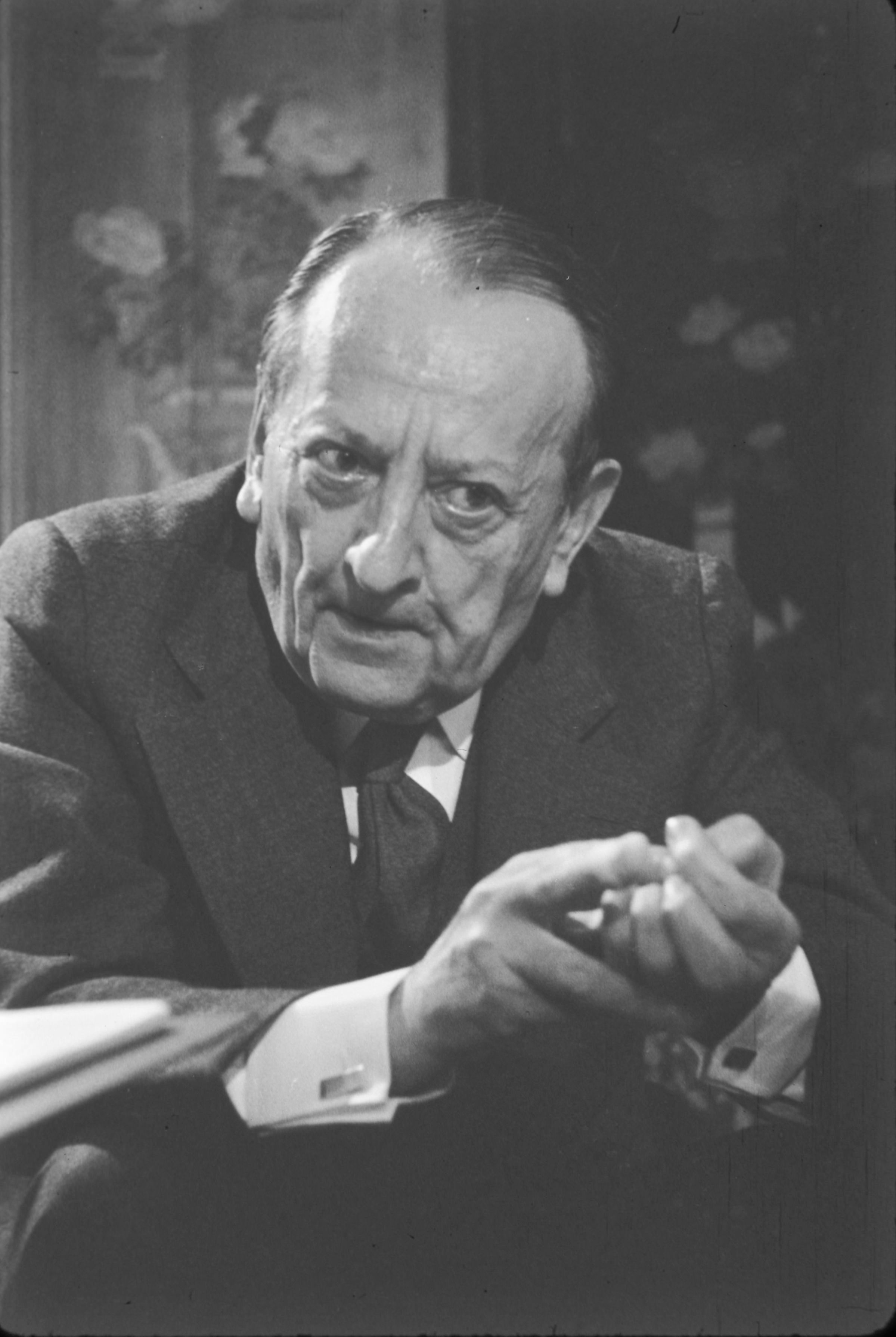 André Malraux, 1974.